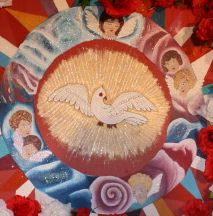 Bandeira que encima o mastro do Divino, de Pirenópolis.